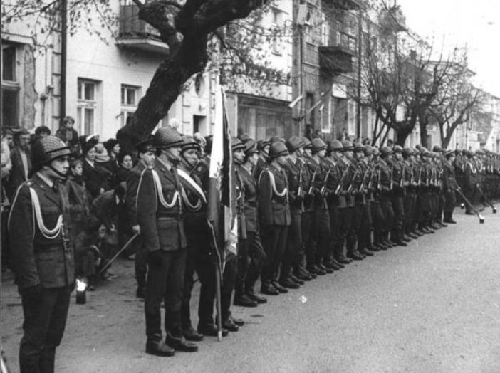 Garnizon Przasnysz, 1994r. Kompania honorowa JW 4420 podczas uroczystości patriotycznej w Rynku